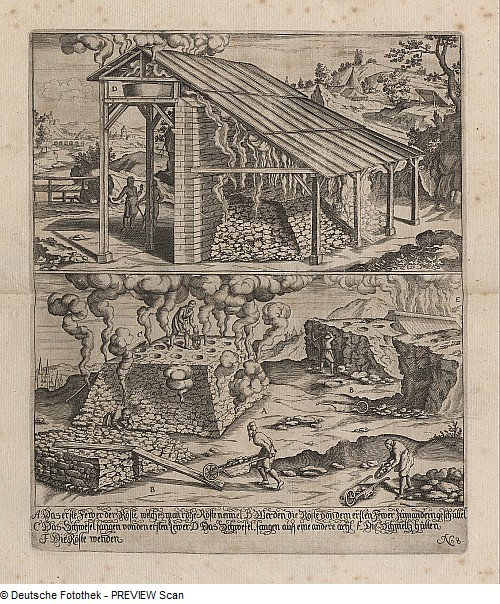 Original image description from the Deutsche Fotothek Bergbau & Metallurgie & Rösten & Blei